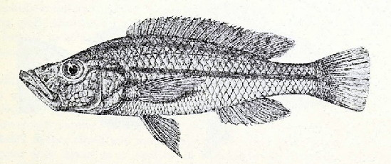 Haplochromis xenostoma